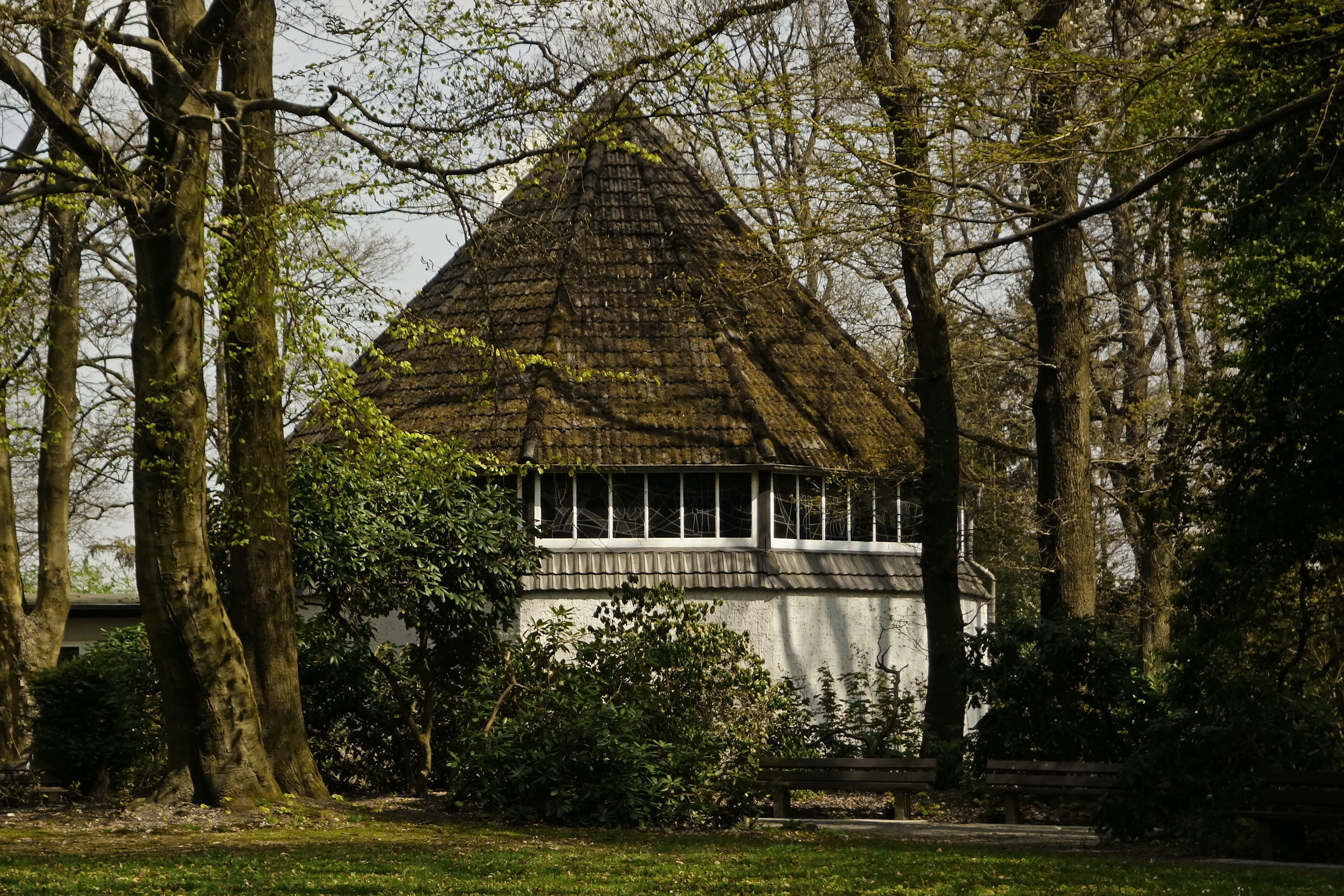 Die Johanneskirche liegt im Süden des Wuppertaler Stadtbezirks Elberfeld am Rande des von-der-Heydt-Parks, in der Nähe des Friedenshains. Als eine der 43 Notkirchen des Architekten Otto Bartning (1883–1959) wurde die Johanneskirche 1948/1949 nach dem Notkirchenprogramm des Evangelischen Hilfswerks für die von schweren Kriegsschäden betroffene Evangelisch-lutherische Gemeinde Elberfeld erbaut. Finanziert wurde der Bau hauptsächlich durch Spenden der amerikanischen Sektion des Lutherischen Weltbundes. Die Johanneskirche wurde am 17. April 1949 als erster Kirchenneubau Wuppertals nach dem Zweiten Weltkrieg eingeweiht. Signifikantes Merkmal ihrer reduktionistischen Architektur ist die (von außen nicht sichtbare) zeltartige Dreigelenkbinderkonstruktion aus Holz und ein vorwiegend aus Trümmersteinen errichtetes, außen verputztes Mauerwerk. Der Grundriss entspricht dem Typ B des Notkirchenprogramms mit 5/10-Chorschluss. Die Bedeutung Bartnings liegt unbestritten in seinem Beitrag zur Entwicklung des modernen protestantischen Kirchenbaus. Bartning sah den Kirchenbau als klar umrissene Bauaufgabe an und hat sich sowohl mit dessen räumlicher Gestaltung als auch mit der Problematik von Technik und Materialien theoretisch und praktisch auseinandergesetzt. Erhaltung und Nutzung liegen daher gemäß § 2 (1) DSchG aus städtebaulichen, wissenschaftlichen und stadthistorischen Gründen im öffentlichen Interesse. Die Unterschutzstellung erstreckt sich auf das gesamte Gebäude. This is a photograph of an architectural monument.